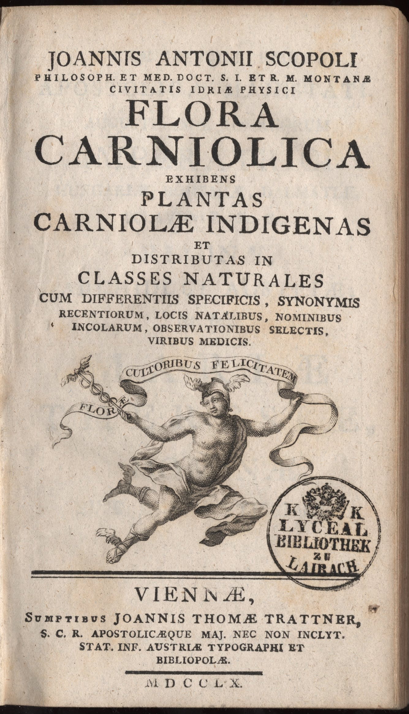 Naslovnica knjige Flora Carniolica.